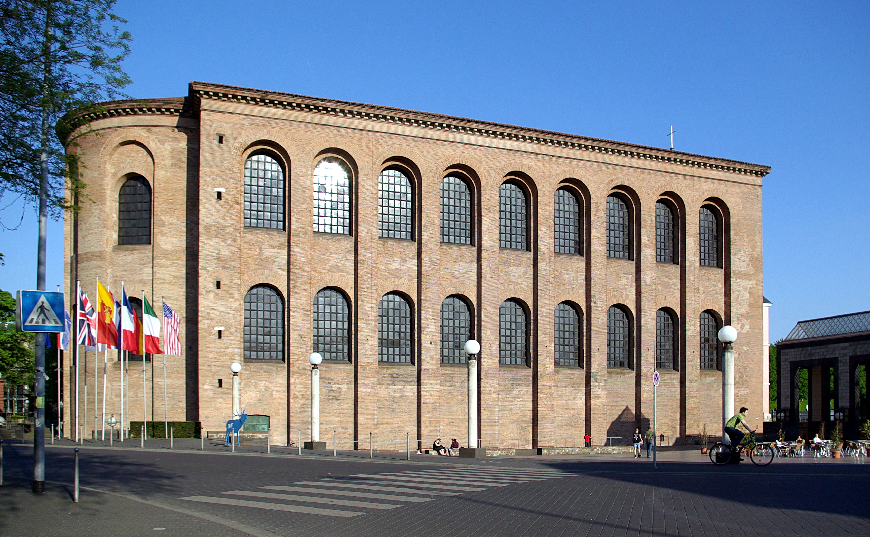 Trier, Konstatinbasilika